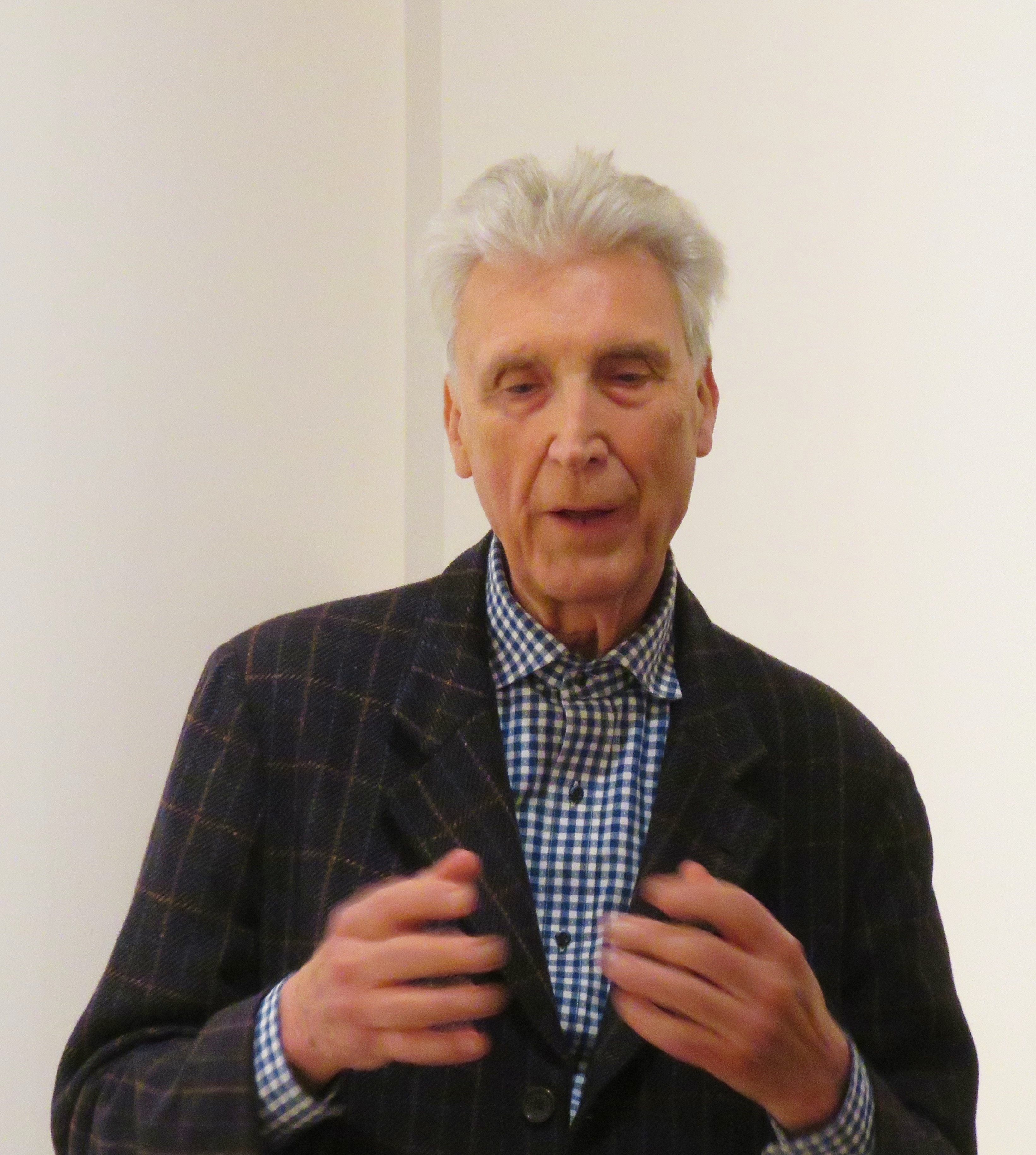 Volker Feierabend al Mart di Rovereto alla presentazione riservata Membership: "Passione. 12 progetti per l'arte italiana" del 24 maggio 2019 - Ogni autorizzazione dell'utilizzo dell'immagine è legata all'esclusivo ambito museale e professionale. Ogni altro utlizzo deve essere concordato con il diretto interessato che ha permesso esplicitamente di essere fotografato durante un momento di incontro di lavoro legato alla sua funzione.